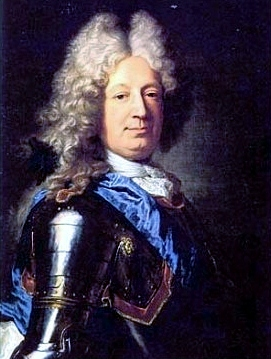 Ritratto del marchese du Luc a opera del famoso pittore Nattier, defunto nel 1776, conservato in collezione privata.